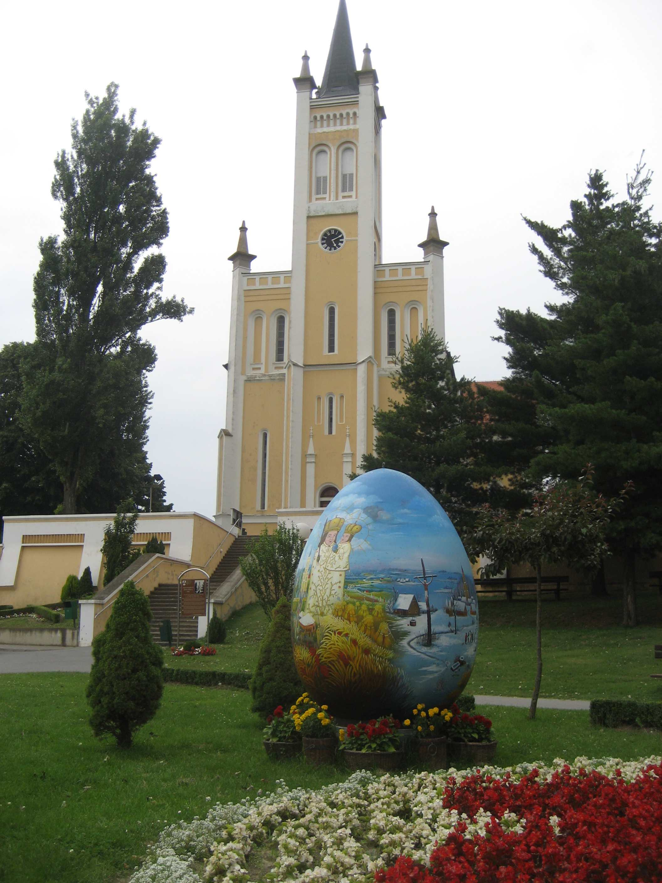 Crkva u Molvama